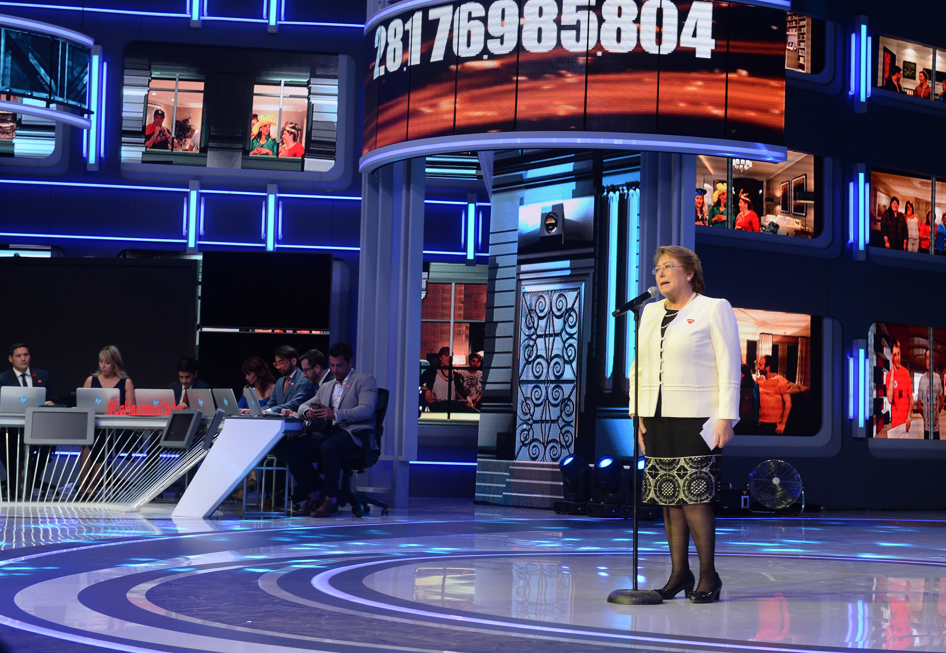 Gobierno de Chile. Inauguración de la 27° Teletón 2015 "La Hacemos Todos"